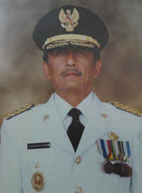 Foto resmi Gubernur Jawa Timur Basofi Sudirman